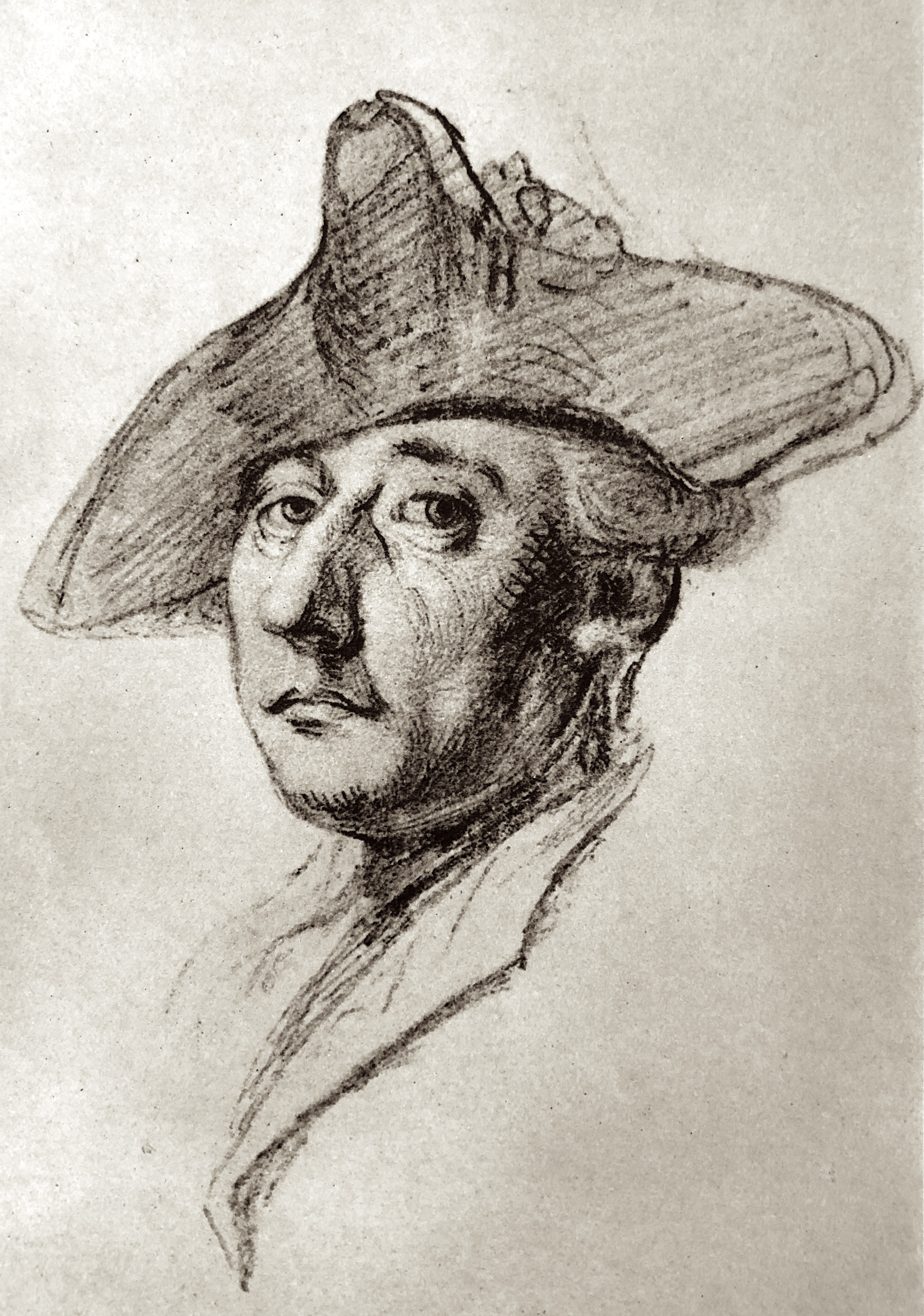 Portrait des Schweizer Politikers Salomon Landolt